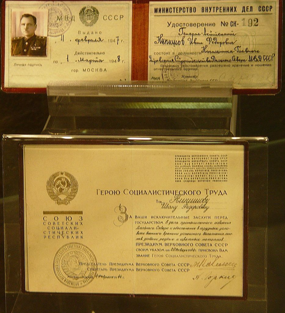 Служебное удостоверение и Грамота Героя Социалистического Труда И. Ф. Никишова. Из экспозиции Магаданского краеведческого музея.